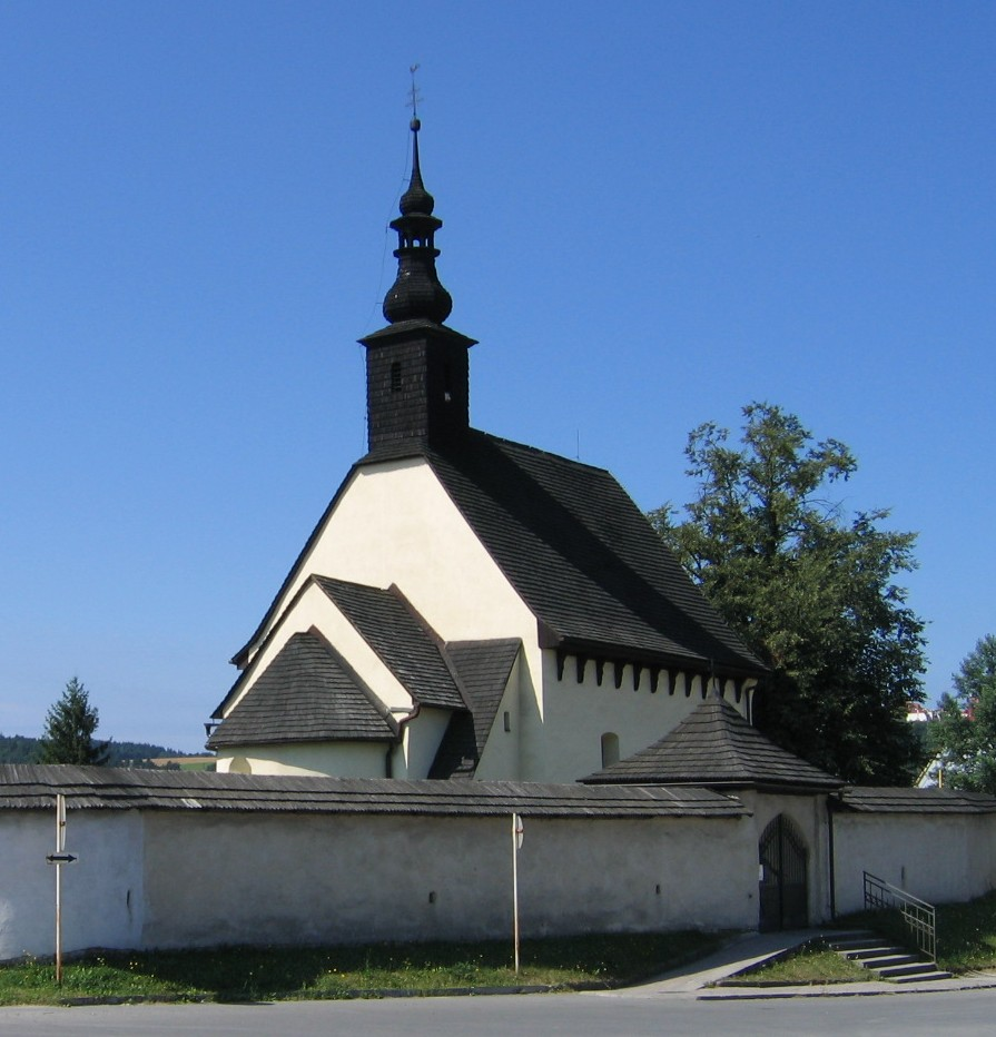 Kostol sv. Štefana, Žilina This medium shows the protected monument with the number 511-1428/1 in the Slovak Republic. This medium shows the protected monument with the number 511-1428/3 in the Slovak Republic.